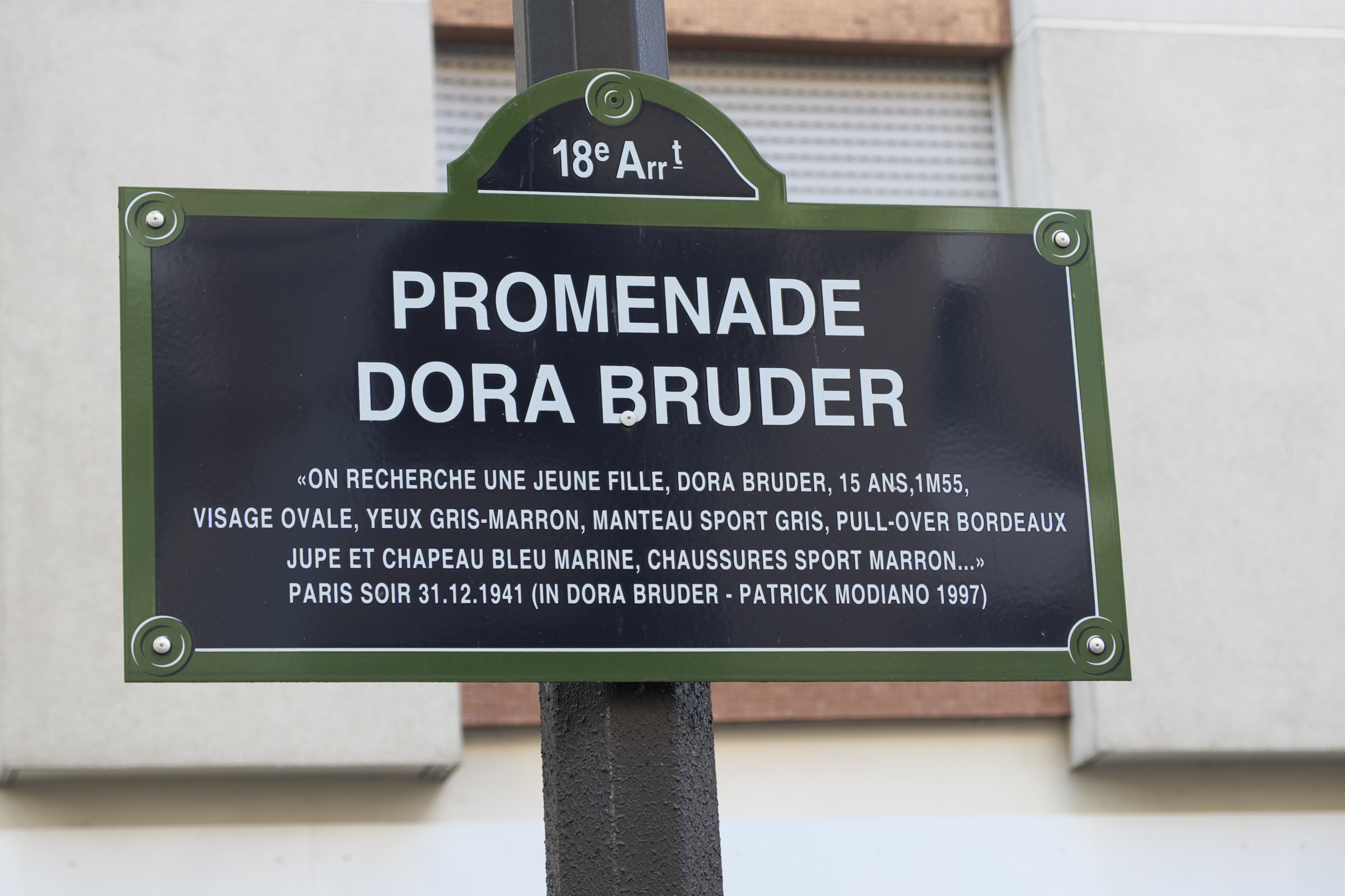 Straßenschild Promenade Dora Bruder im 18. Arrondissement in Paris (Île-de-France/Frankreich)